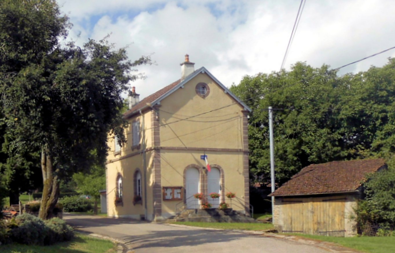 La mairie de Girefontaine